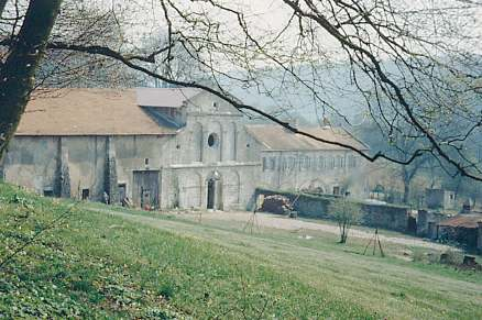 Ancienne abbaye sainte marie au bois Vilcey-sur-Trey meurthe-et-moselle france